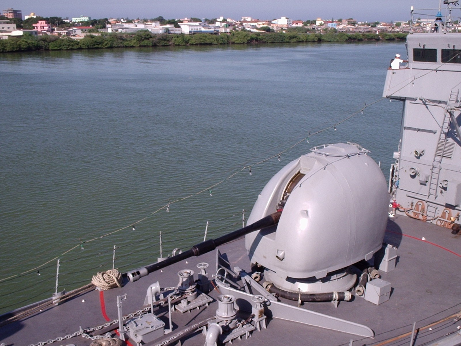 Brazilian Corvette Inhaúma